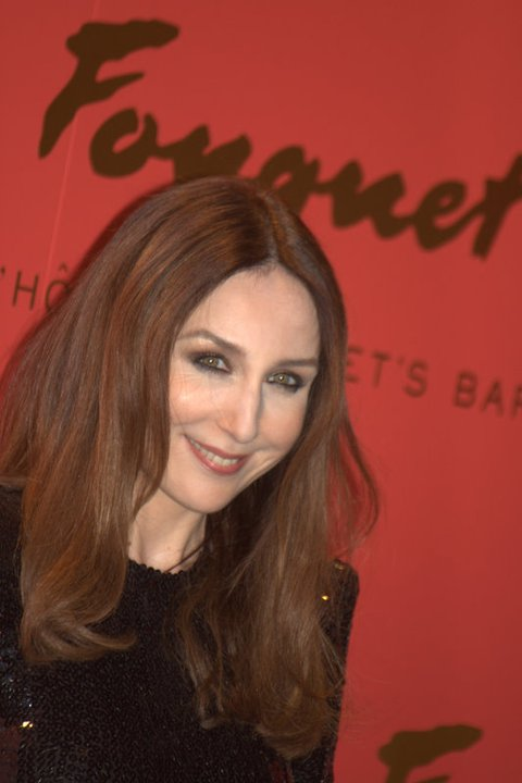 Elsa Zylberstein à la cérémonie des César du cinéma